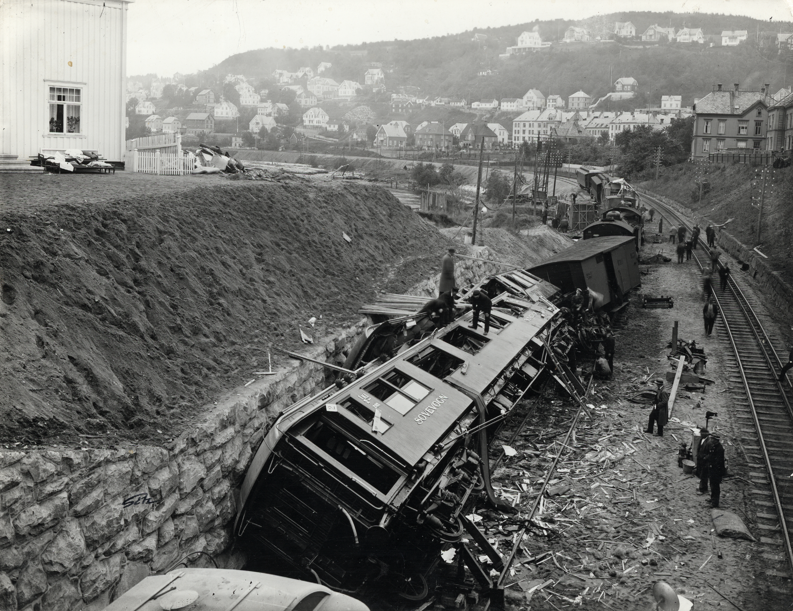 Format: Fotopositiv Dato / Date: 18. september 1921 Fotograf / Photographer: Alf Schrøder (1880 - 1951) Sted / Place: Trondheim Wikipedia: Nidareid-ulykken WikiStrinda: Nidareid-ulykken Eier / Owner Institution: Trondheim byarkiv, The Municipal Archives of Trondheim Arkivreferanse / Archive reference: Tor.H45.F9562 Merknad: Togulykke ved Nidareidtunellen den 18. september 1921. I forbindelse med Dovrebanens høytidelige åpning i Trondheim 17. september hadde det kommet et stort antall prominente gjester til byen. Da en del av gjestene skulle reise tilbake til hovedstaden om kvelden den 18. september, kolliderte deres ekstratog med et annet tog like sør for Nidareidtunnelen. Det andre toget skulle ventet på Marienborg, men føreren hadde ikke oppfattet denne ordren. Seks personer omkom i ulykken og 13 ble skadd. (Trondheim byleksikon, 2008)